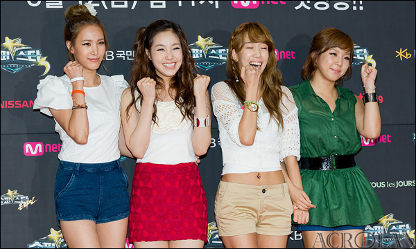 쥬얼리. 슈퍼스타K 3 하이라이트 시사회 레드카펫 행사장에서